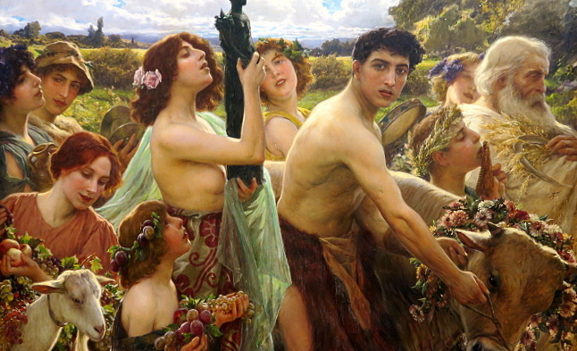 Ave Natura, olio du tela, 148 x 290 cm.